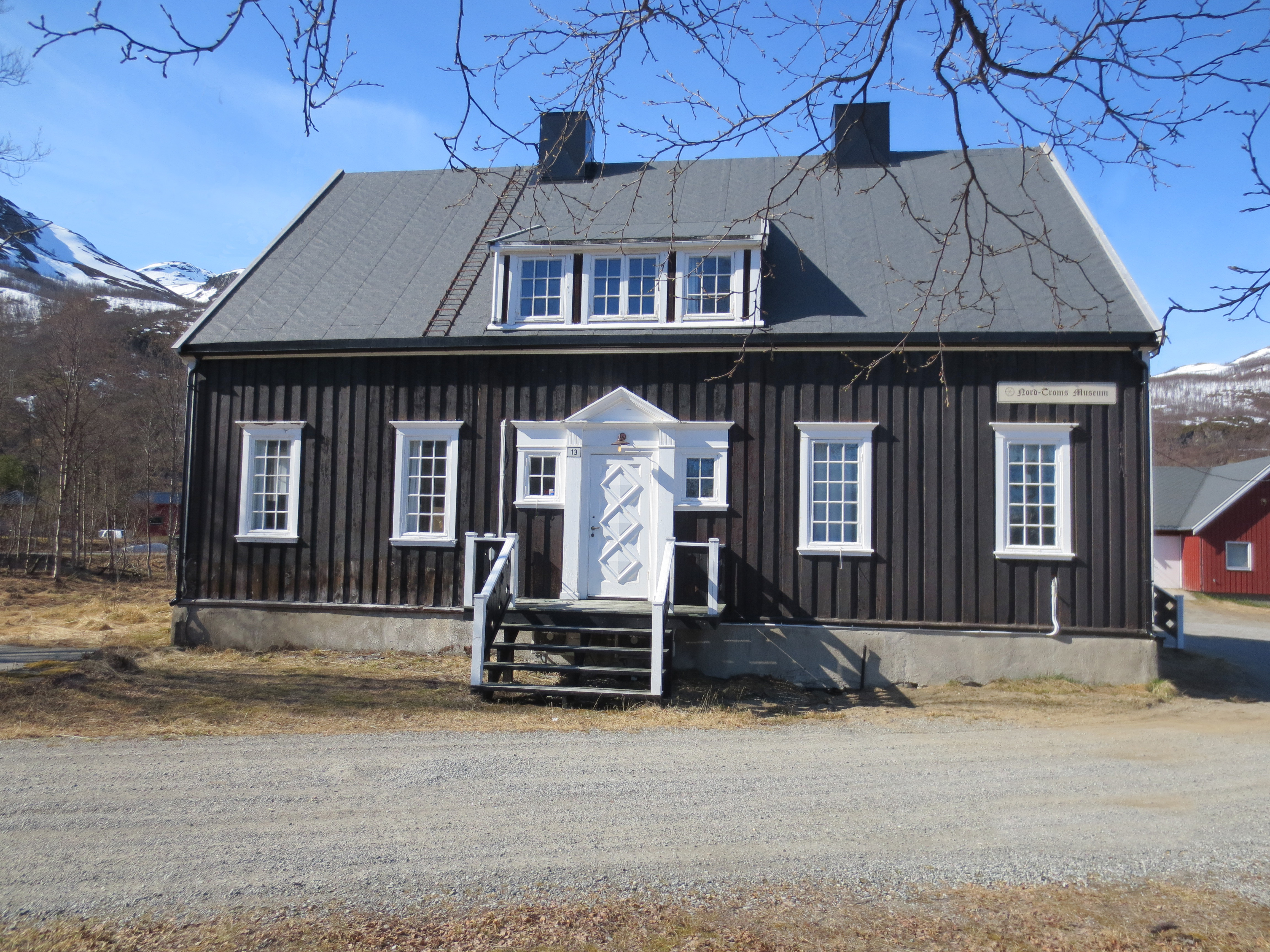 Administrasjonsbygg for Nord-Troms museum